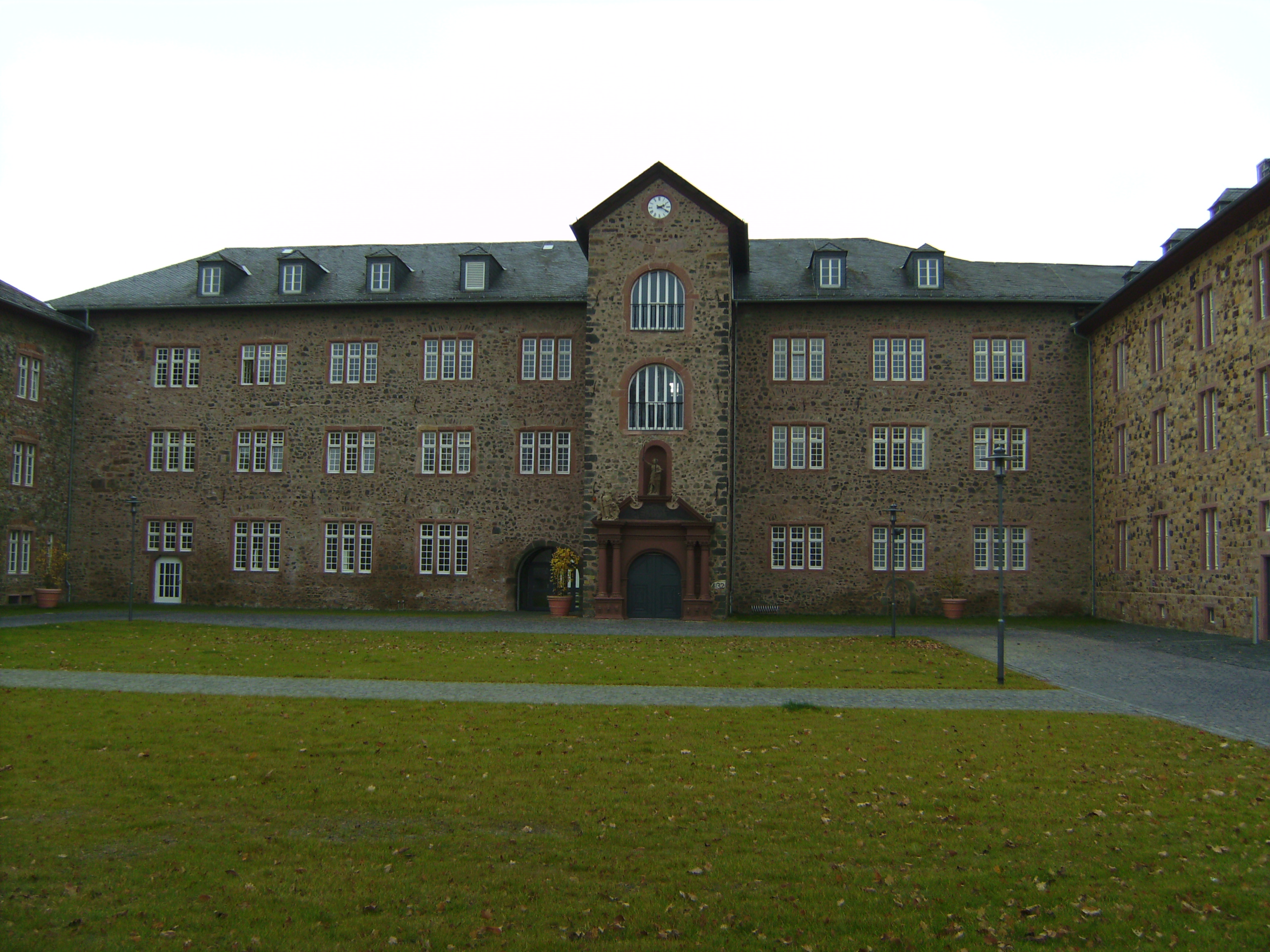 Schloss-Kaserne in Butzbach